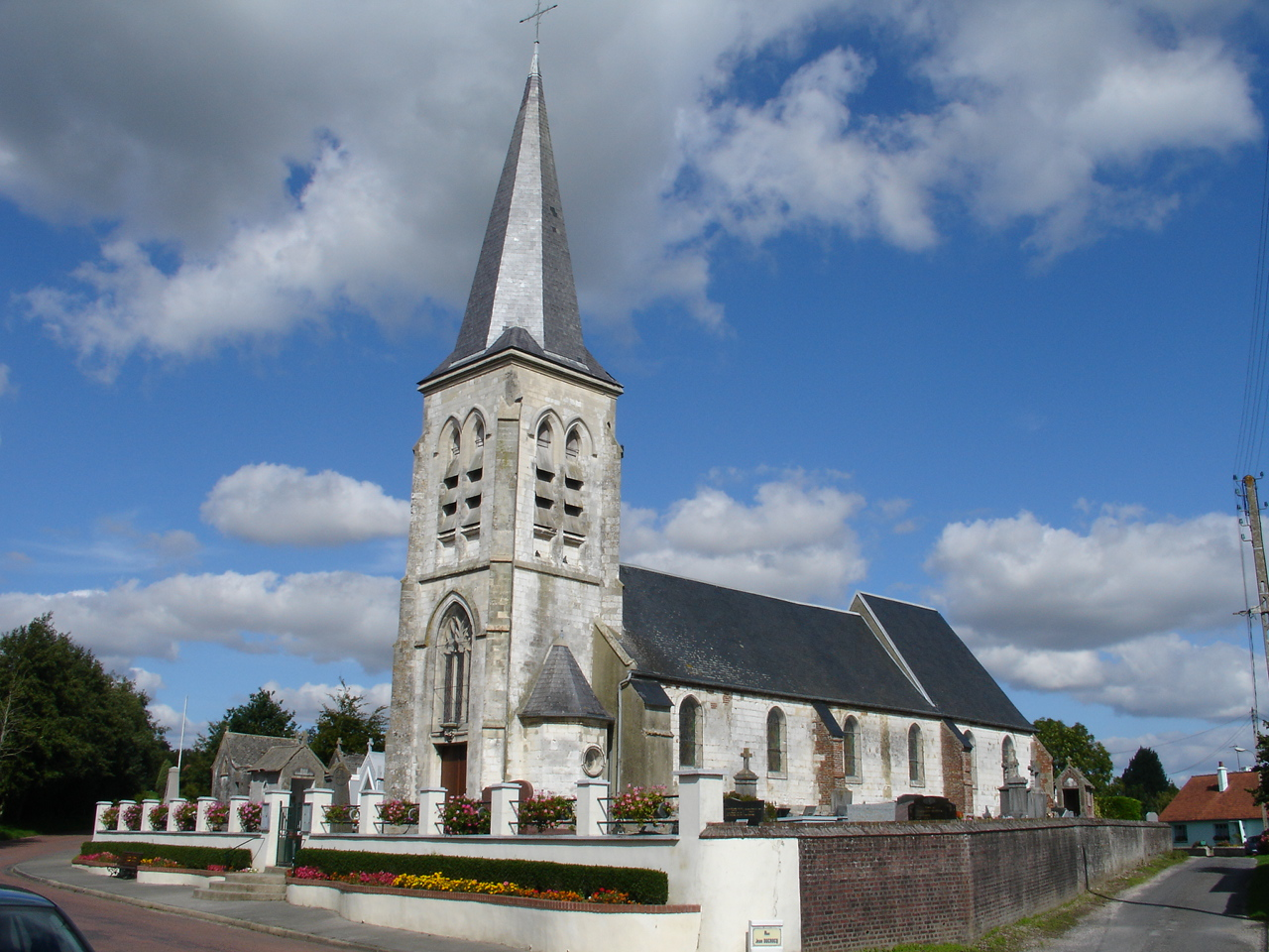 Église de Sorrus